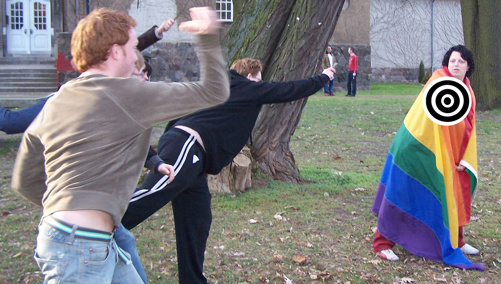 Homophobia, Biphobia, Queerphobia, Discrimination